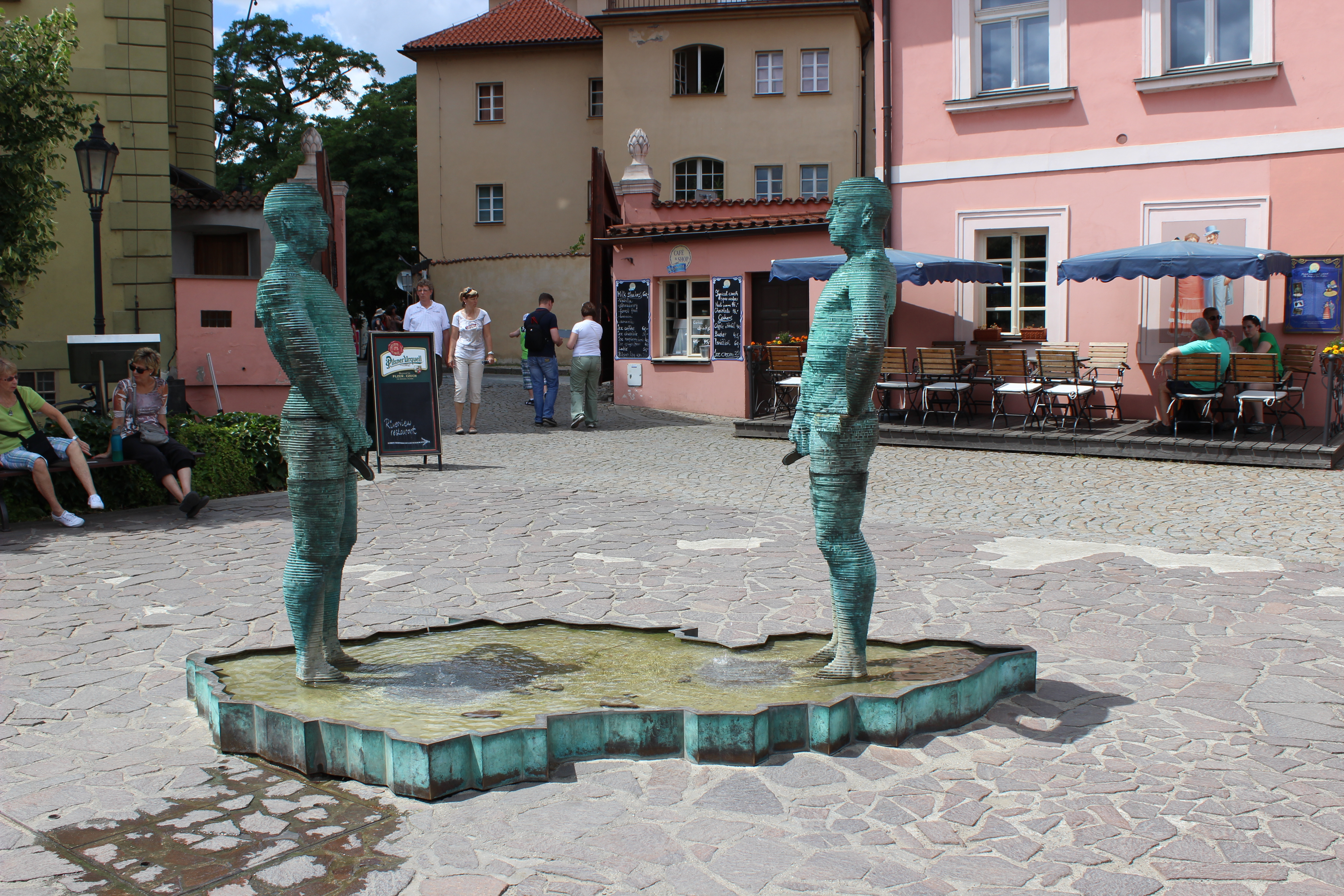 Socha "Proudy" nebo "Piss" od Davida Černého umístěná v pražské Hergetově cihelně.